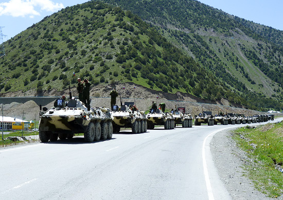 201-я Гатчинская ордена Жукова дважды Краснознаменная военная база